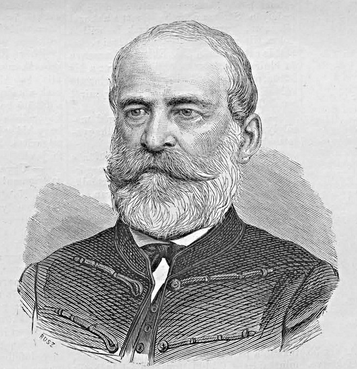 Flór Ferenc (1809–1871) orvos. Rusz Károly metszete. (Vasárnapi Ujság, 1871. július 16.)